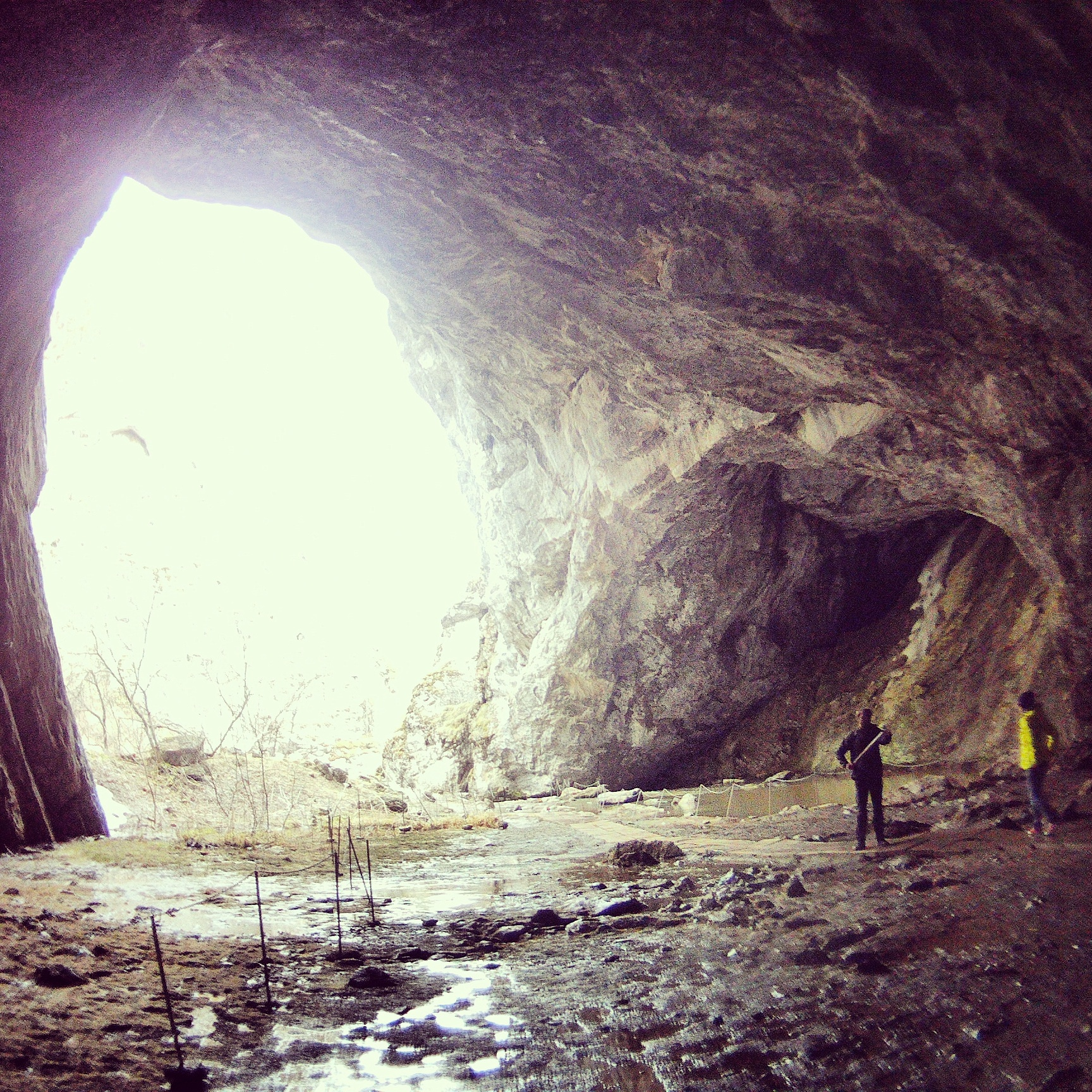 Капова пещера (Шульган-Таш), Бурзянский район This image is related to the protected area of Russia number 0220101